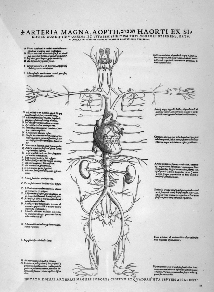 Arteria magna Mots-clés : Anatomie. Circulation (sang) . 19e siècle Auteur de l'ouvrage : VÉSALE, André / VESALIUS, Andreas Ouvrage : Tabulae anatomicae sex Edition : Londres: sir William Stirling Maxwell, 1874